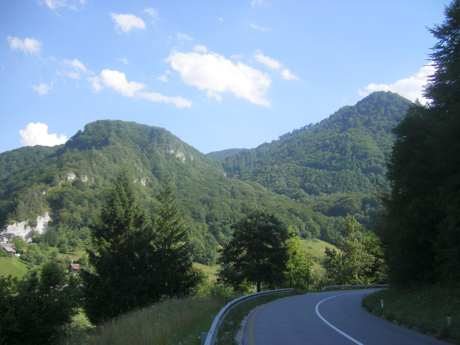 Between Laško and Zidani Most (Savinja Valley)